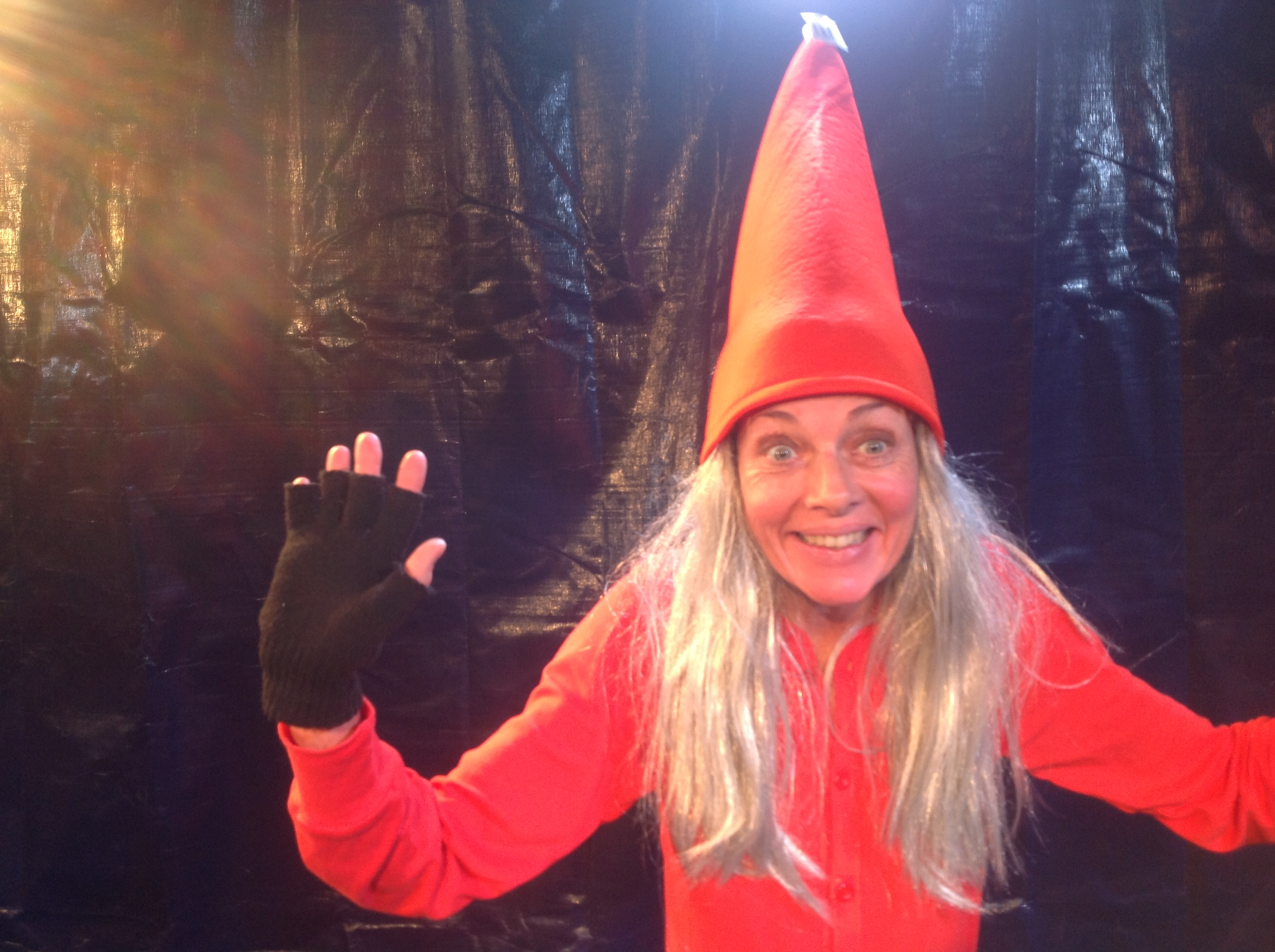 Charlotte i forestilling 2013